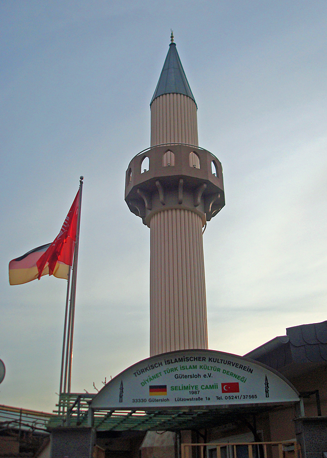 Selimiye Camii, Moschee des Türkisch Islamischen Kulturvereins in Gütersloh, Lützowstraße